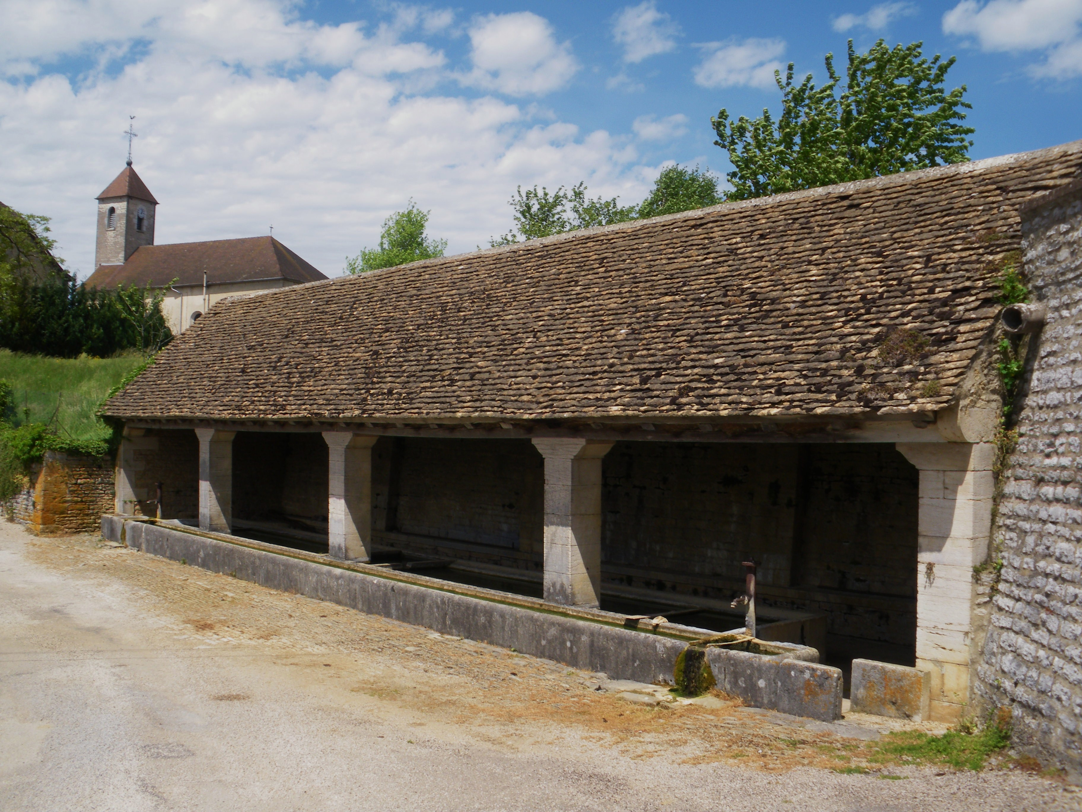 Amondans (Doubs) vue du lavoir